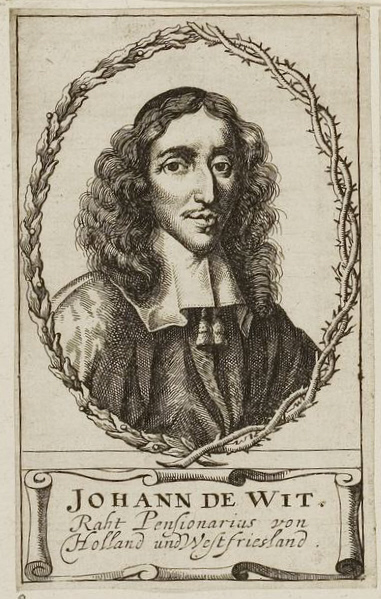 Grafik aus dem Klebeband Nr. 1 der Fürstlich Waldeckschen Hofbibliothek Arolsen Motiv: Johan De Witt